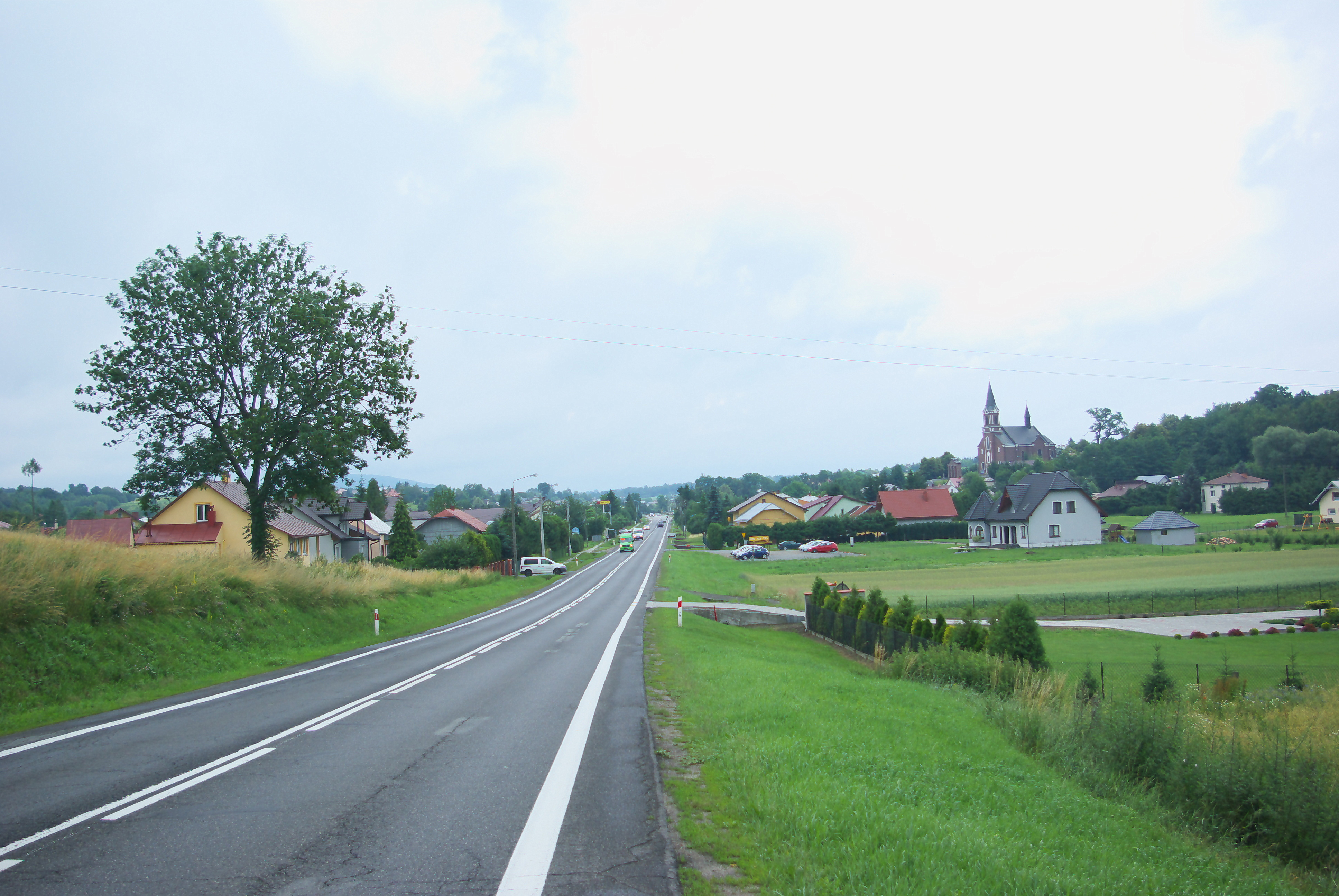 Grabownica Starzeńska